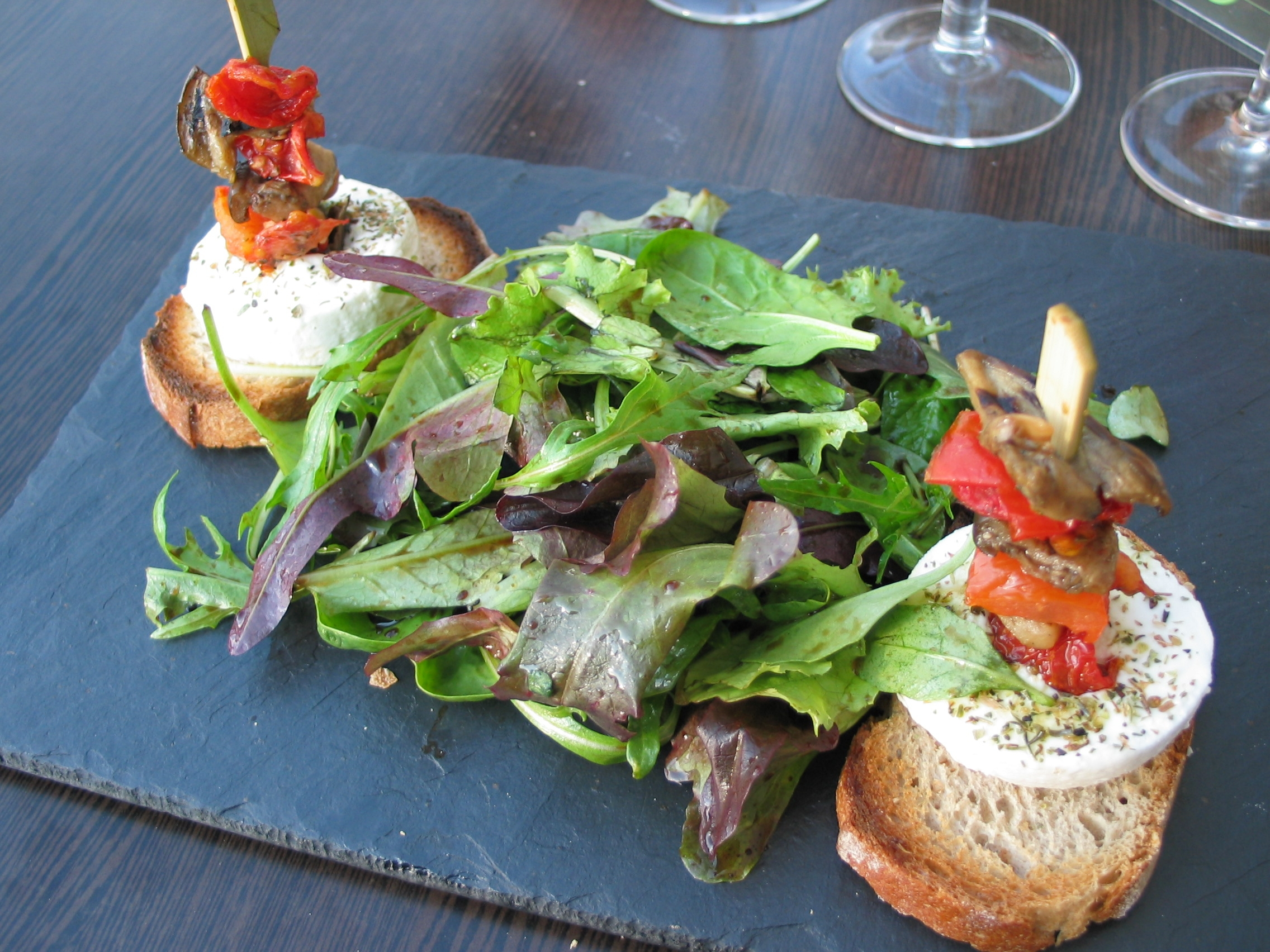 Mesclun, petits légumes marinés et chèvre chaud aux herbes sur toasts.